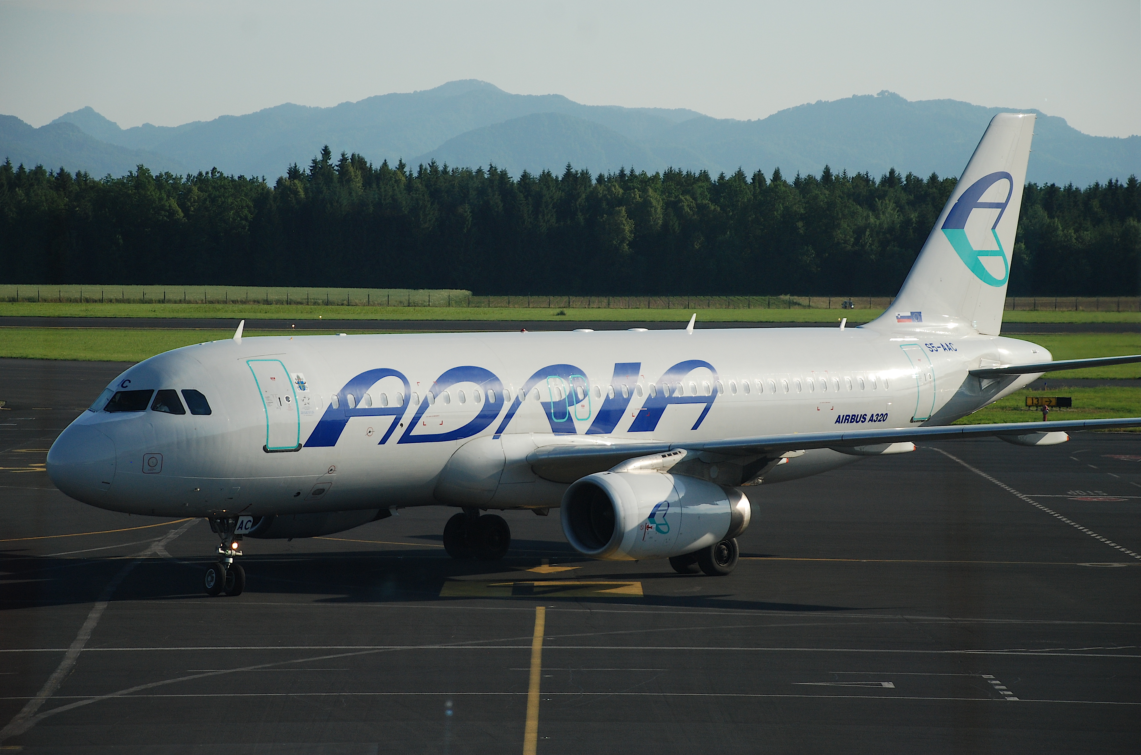 S5-AAC@LJU;14.06.2009/540bd